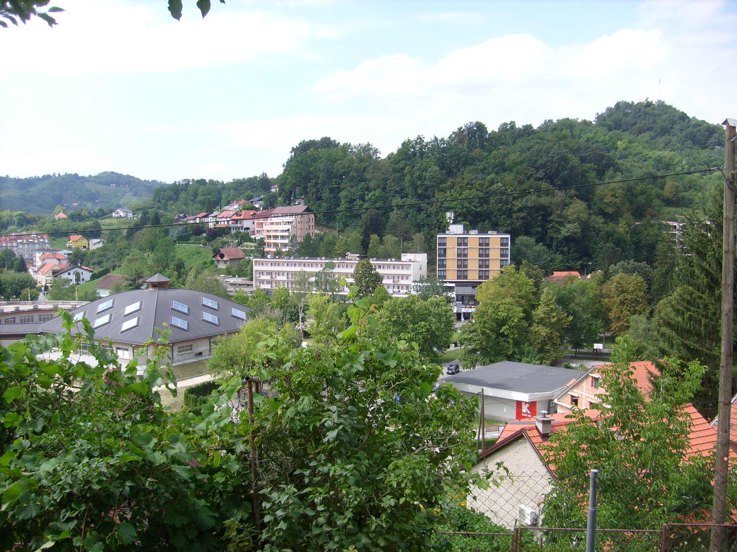 18.08.2010. _ Krapinske Toplice